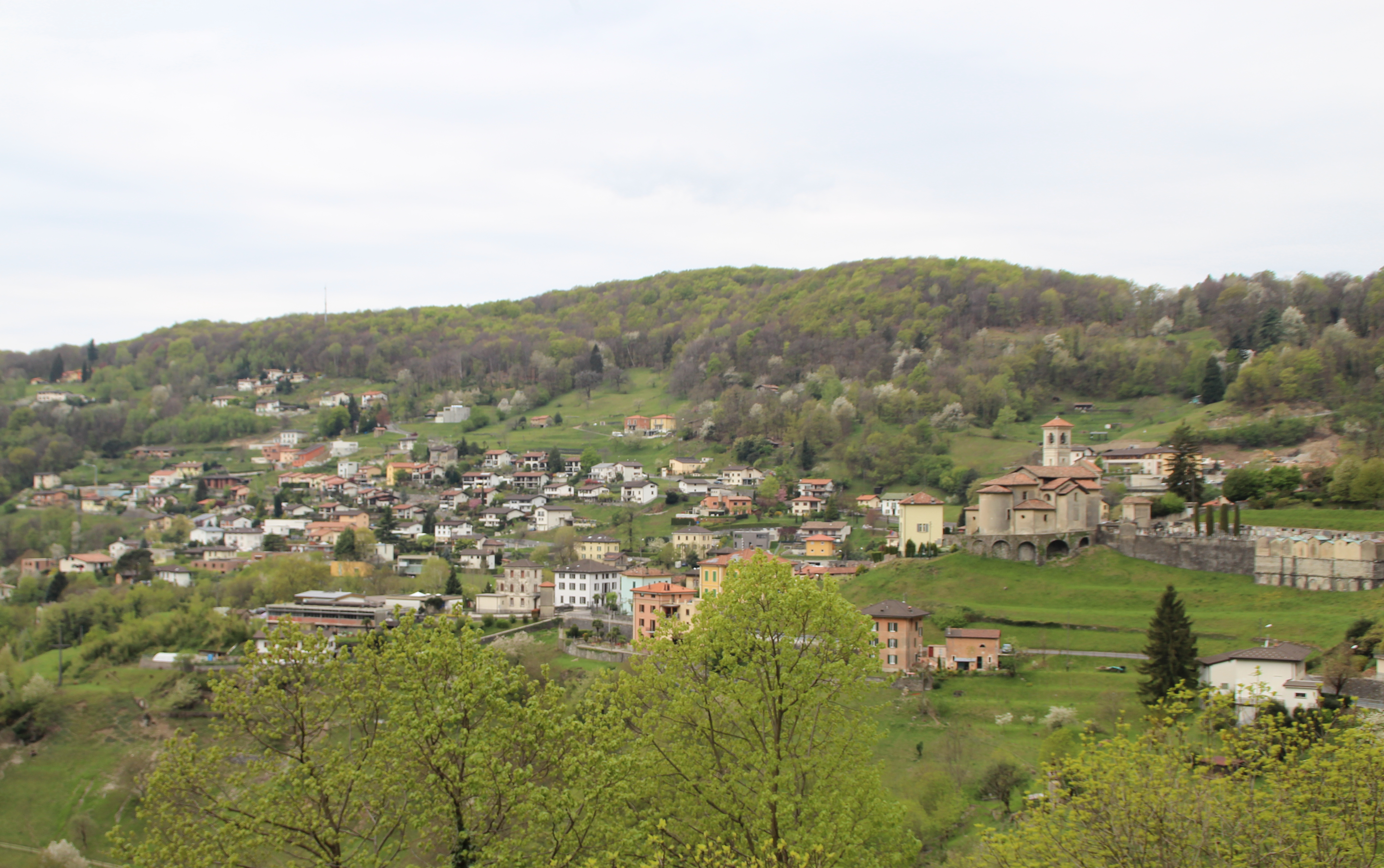 Arogno